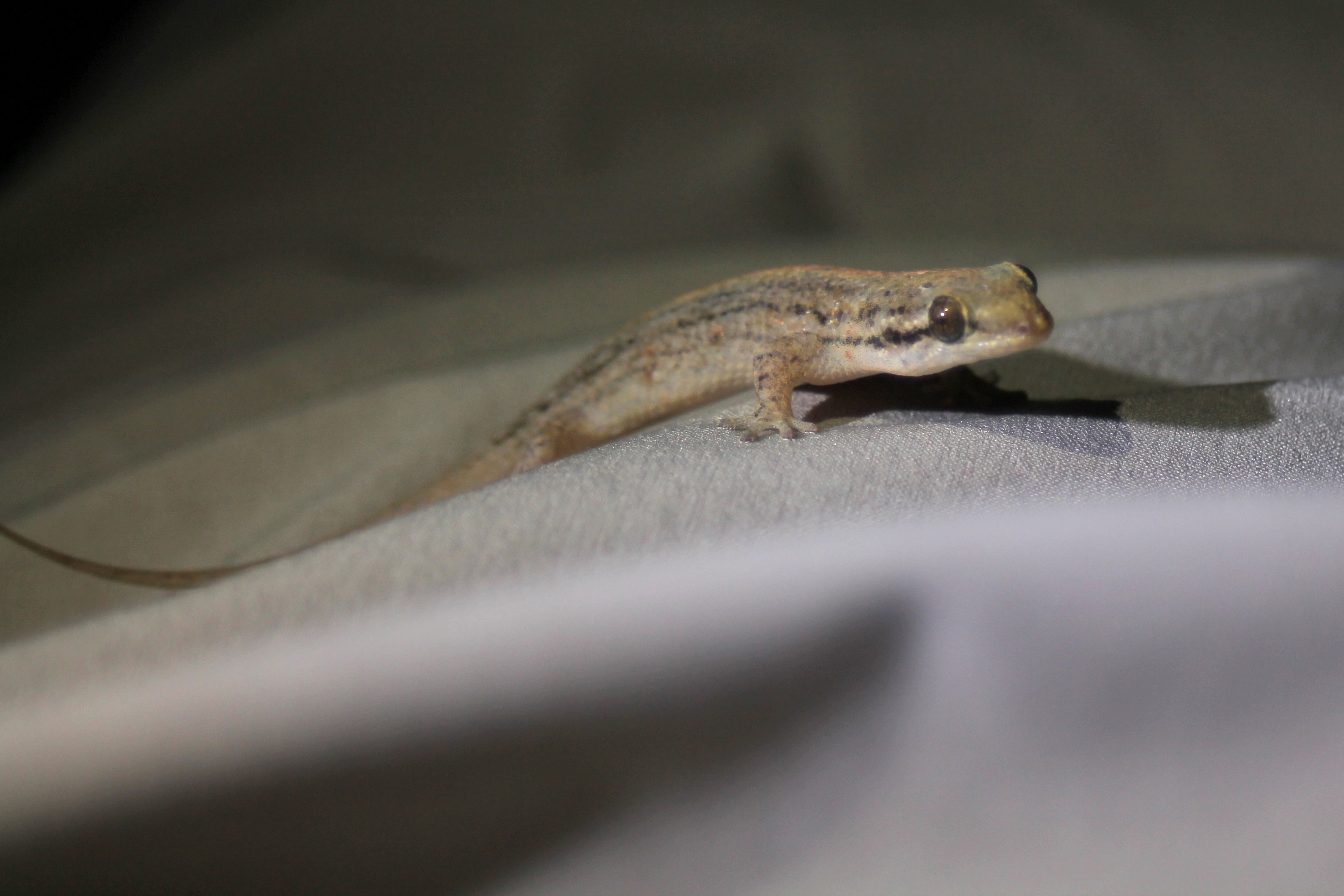 Een gekko gefotografeerd op een overhemd